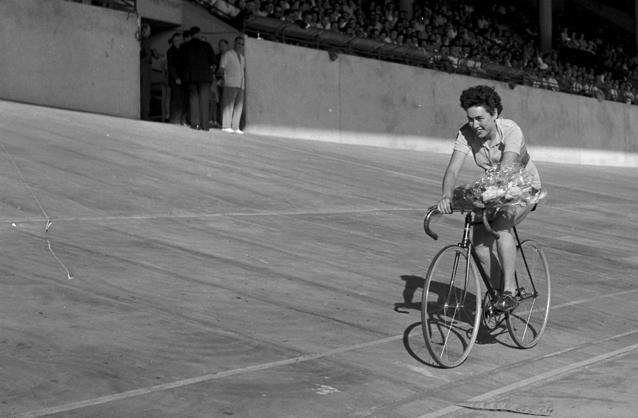 Stadium municipal de Toulouse, 1bis allées Gabriel-Biénès. Octobre 1950. Vue de Jeanine Lemaire, championne de France, sur la piste du stade.